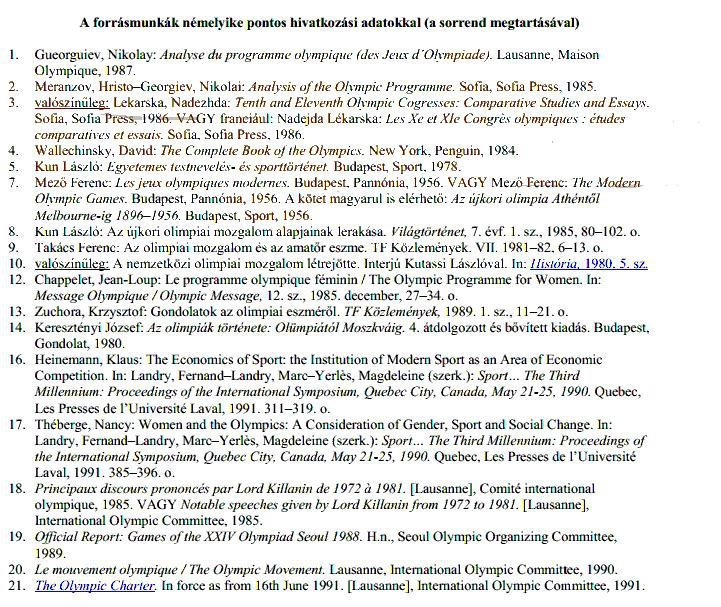 A hvg.hu internetes kiadványának Schmitt ügyről IRT cikkének melléklete pdf, A disszertáció kisdoktori irodalomjegyzéke, képernyő mentés